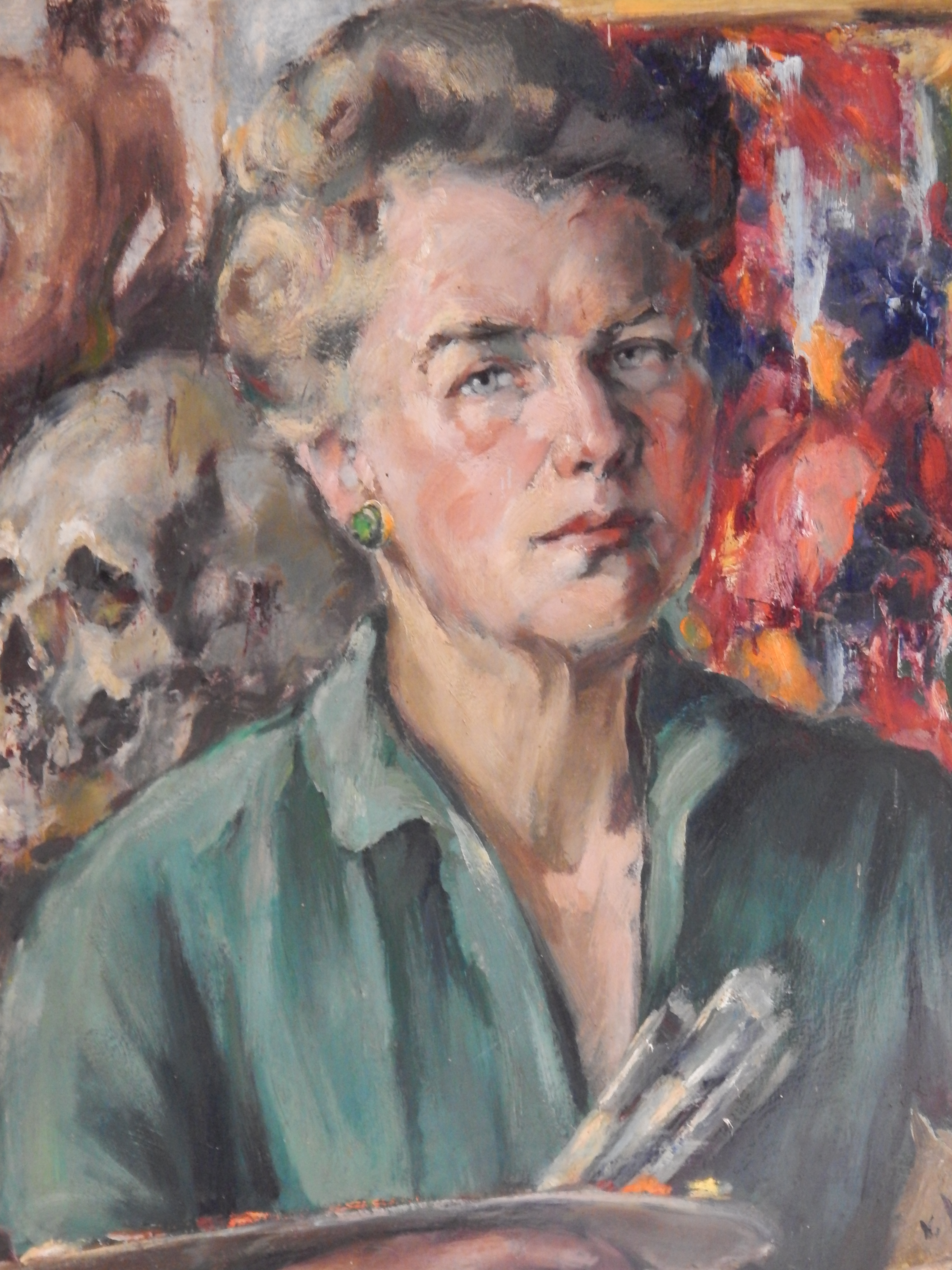 Wisa von Westphalen (1910 - 1993) - Selbstportrait Öl 1968